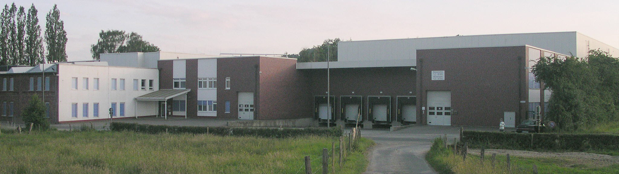 Aachen, Gewerbegebiet Sonnenweg, früher Sitz des IT-Unternehmens ELSA